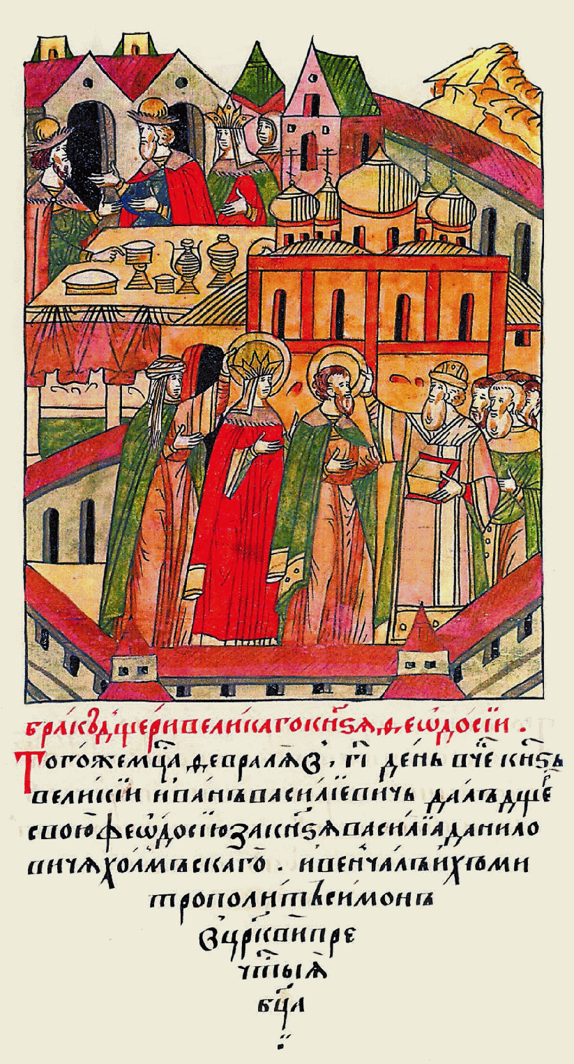 Брак дочери великого князя Феодосии. В том же месяце феврале в 13 день в четверг вели- кий князь Иван Васи- льевич отдал свою дочь Феодосию за князя Василия Даниловича Холмского, и венчал их митрополит Симон в церкви Пречистой Богородицы.